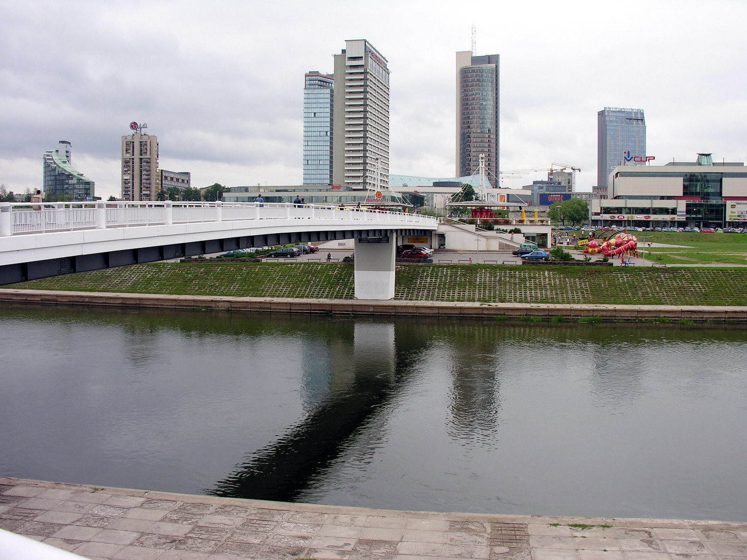 Vilnius Baltasis tiltas Foto: Algirdas, 2006 m. rugpjūčio 8 d., Lietuva